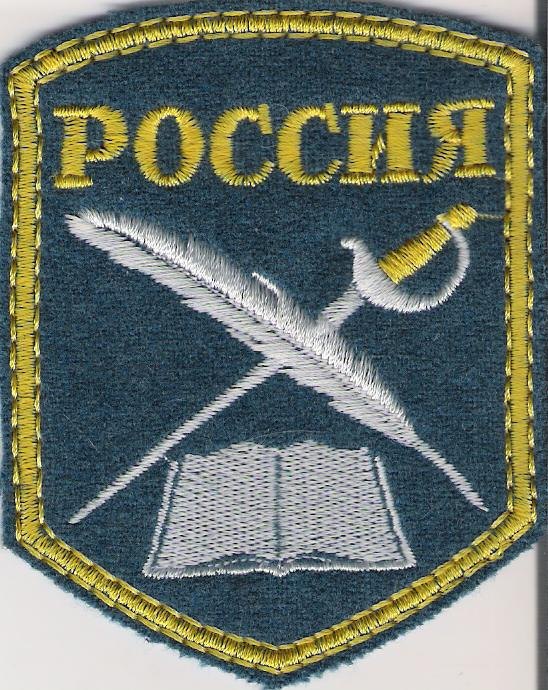 Chevron VKPVKK